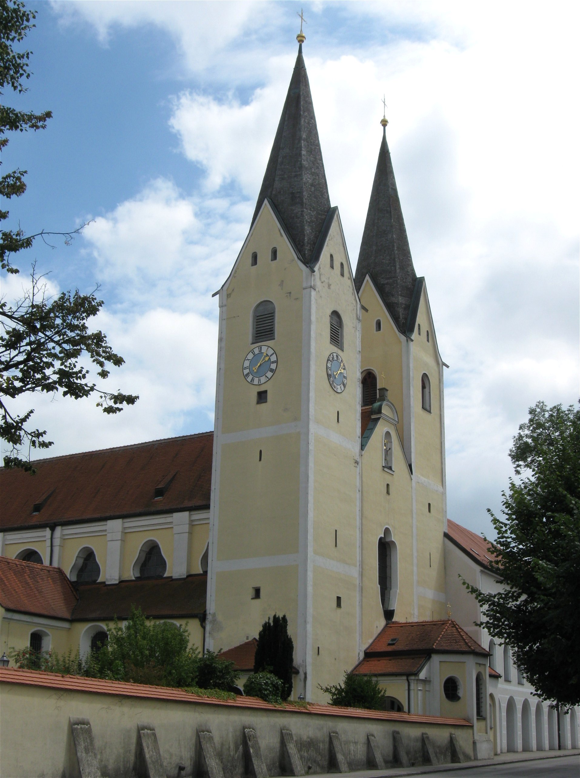 E-1-74-131-1 Kloster Indersdorf.